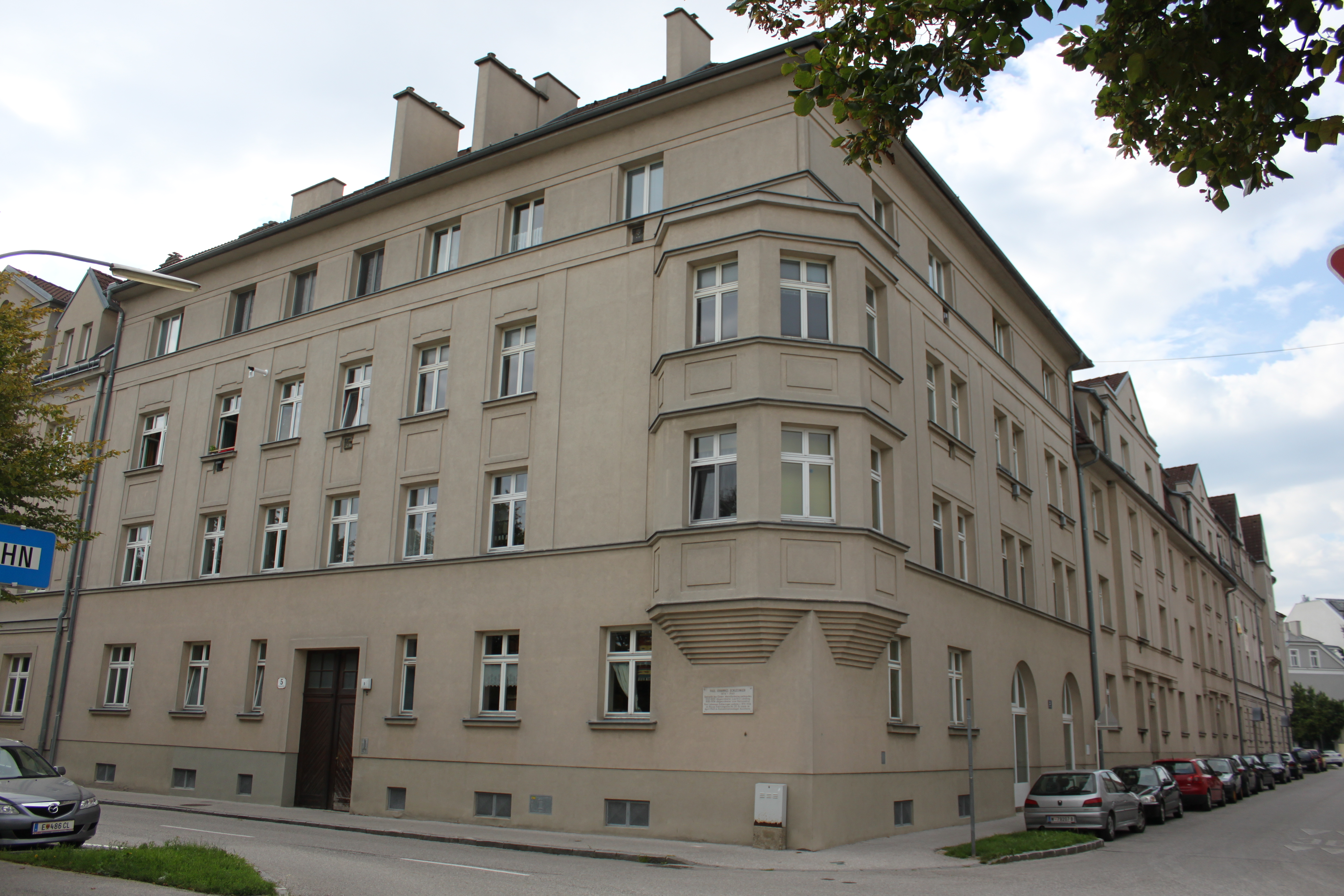 Paul-Johannes-Schlesinger-Hof, Gedenktafel in der Kammanngasse, bei der Ecke Dietrichgasse